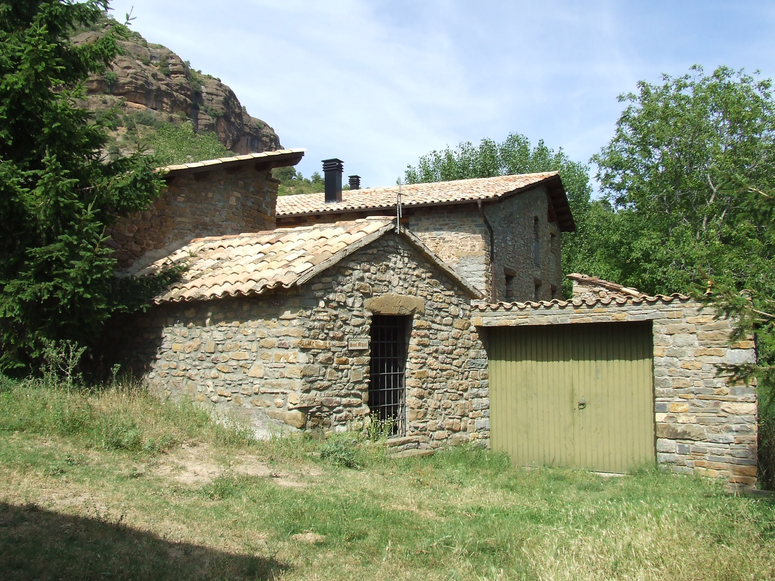 Sant Miquel, rere la casa de Gramuntill (la Pobla de Segur, Pallars Jussà)